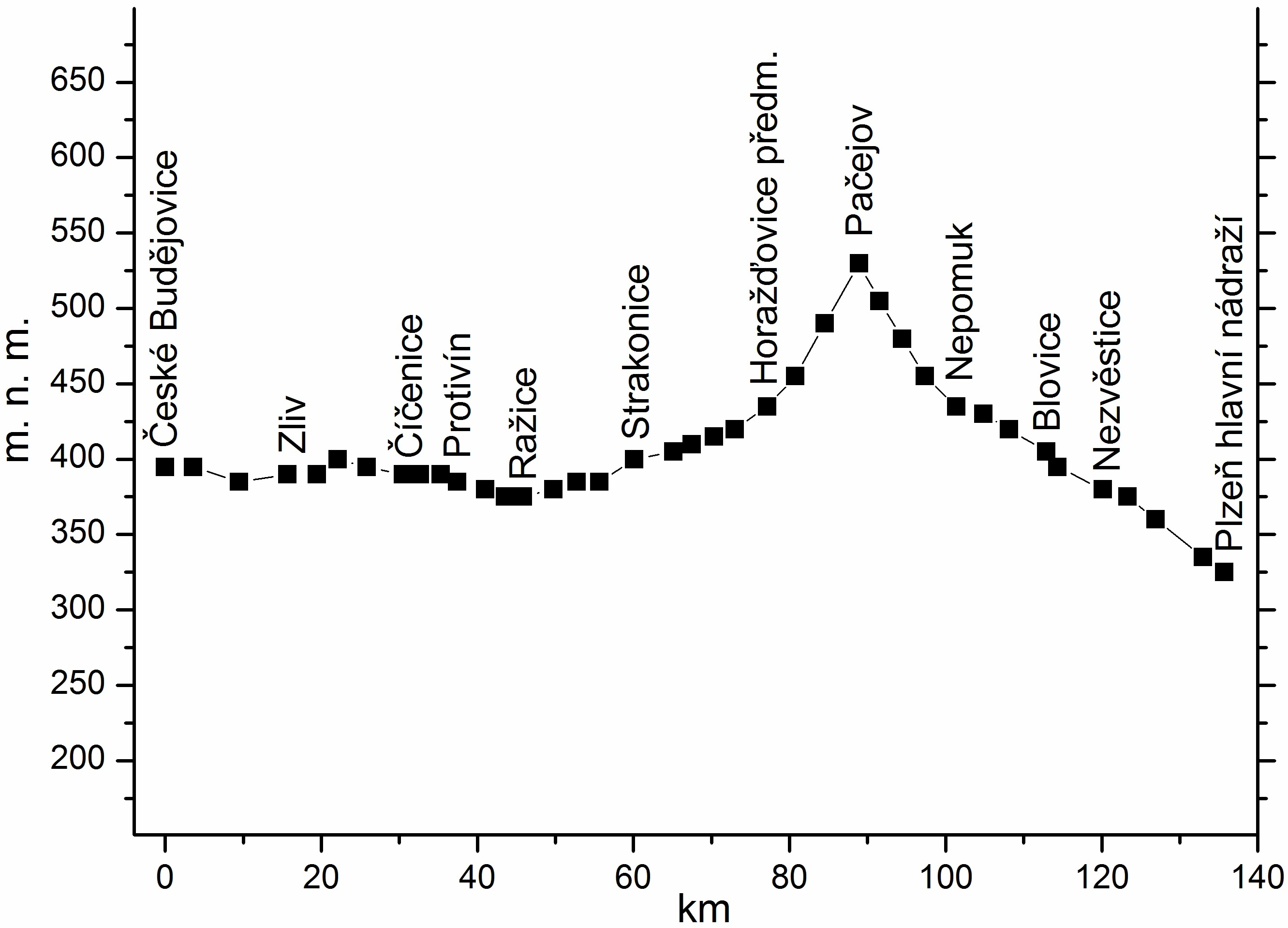 Vereinfachtes Höhenprofil der Bahnstrecke Ceske Budejovice - Plzen